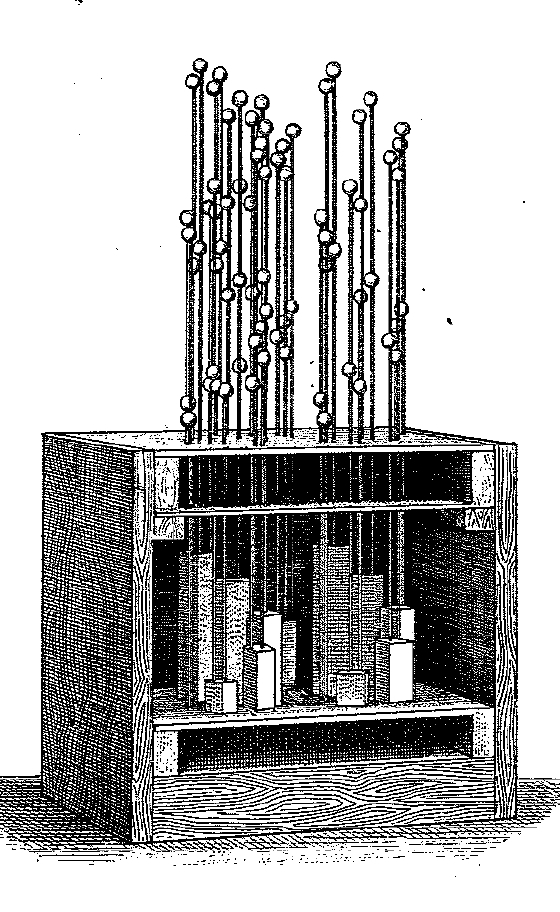 Von Sohncke aus Zigarrenkisten gebautes Demonstrationsmodell zur Veranschaulichung der durch zusätzliche Rotationen entstehenden kristallografischen Raumgruppen